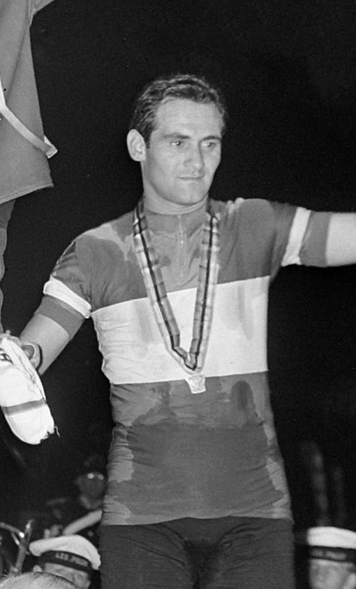 WK Wielrennen op de baan finale prof stayers. Op podium De Lillo (3)